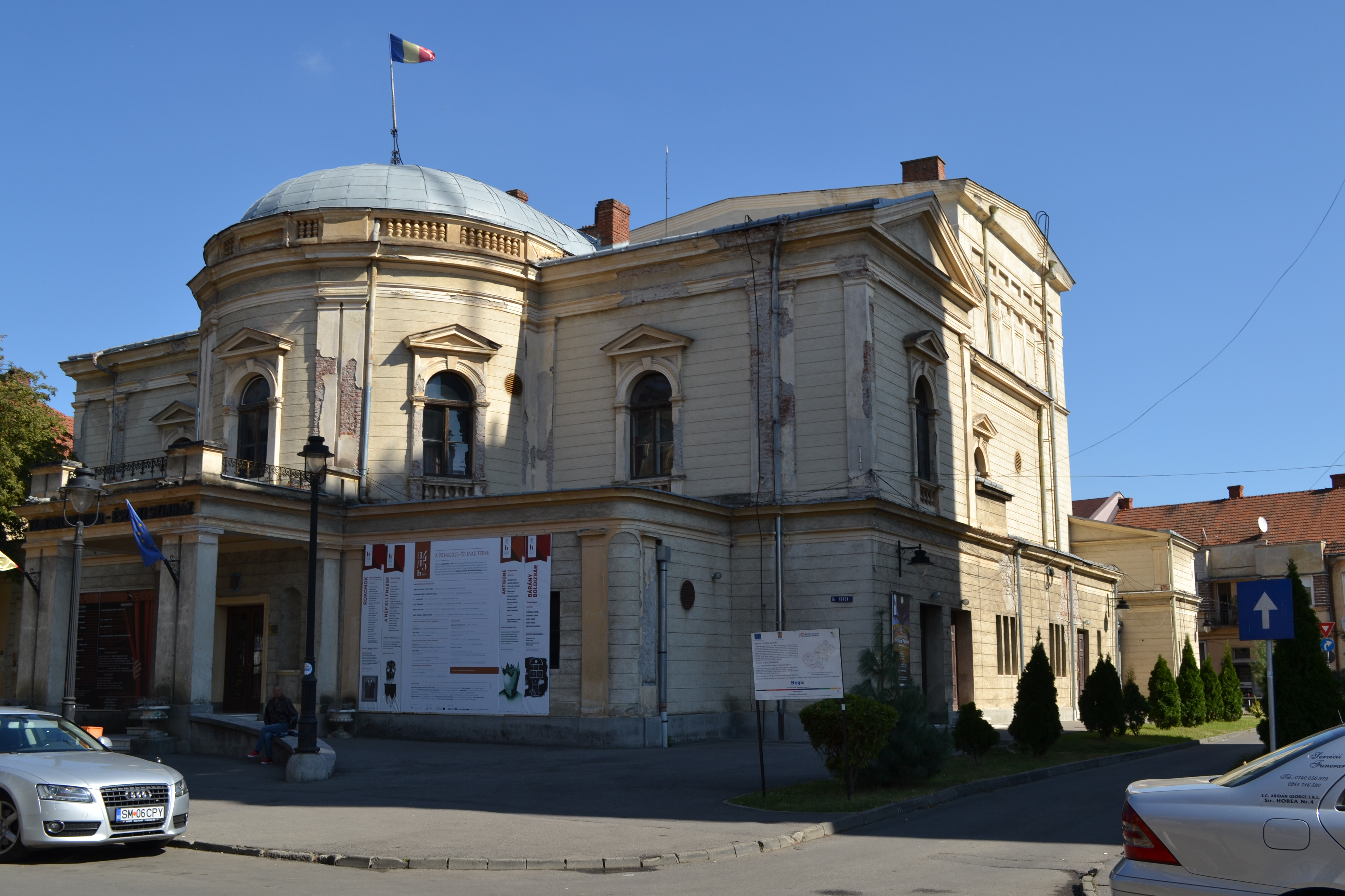 Teatrul de Nord Satu Mare